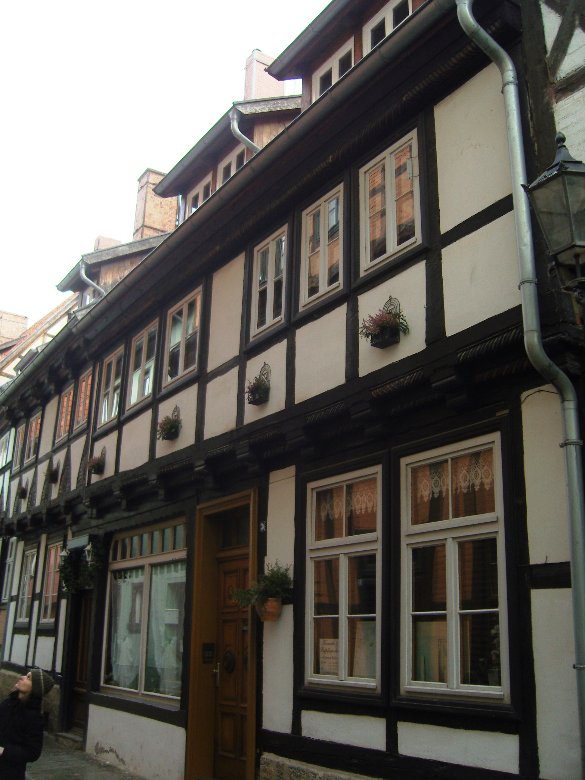 Denkmalgeschützter ehemaliger Ackerbürgerhof in der Straße Stieg 29 in Quedlinburg